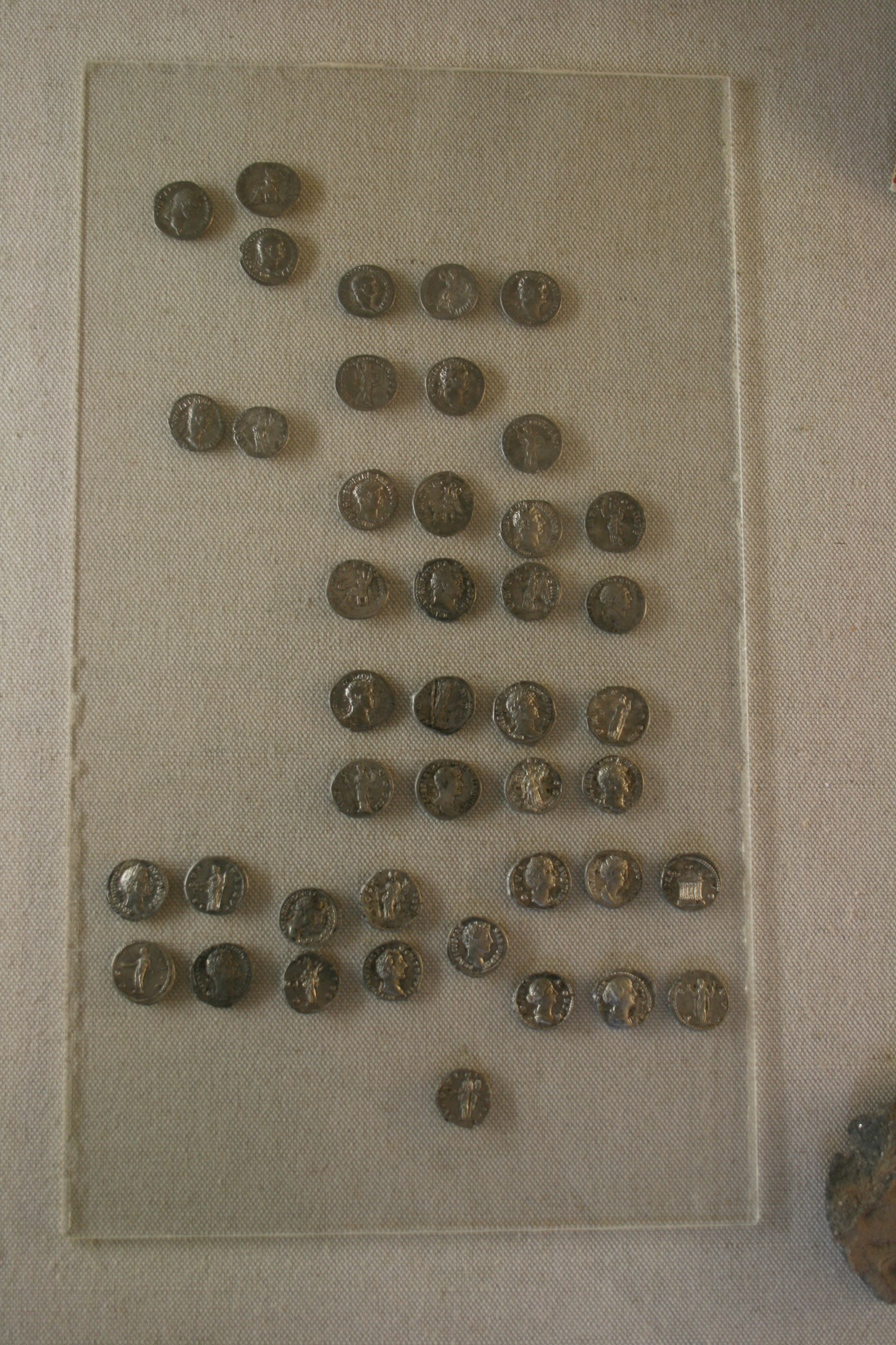 Münzschatz aus dem Kastelldorf Seligenstadt. Ausstellung von Teilen im Landschaftsmuseum Seligenstadt. Mit freundlicher Genehmigung des Museums.